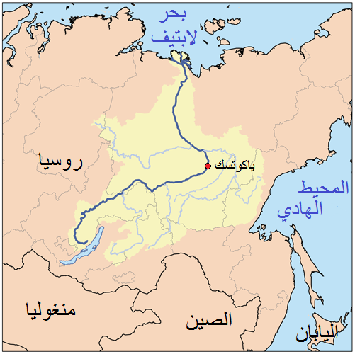 المسطح المائي و مسار نهر لينا